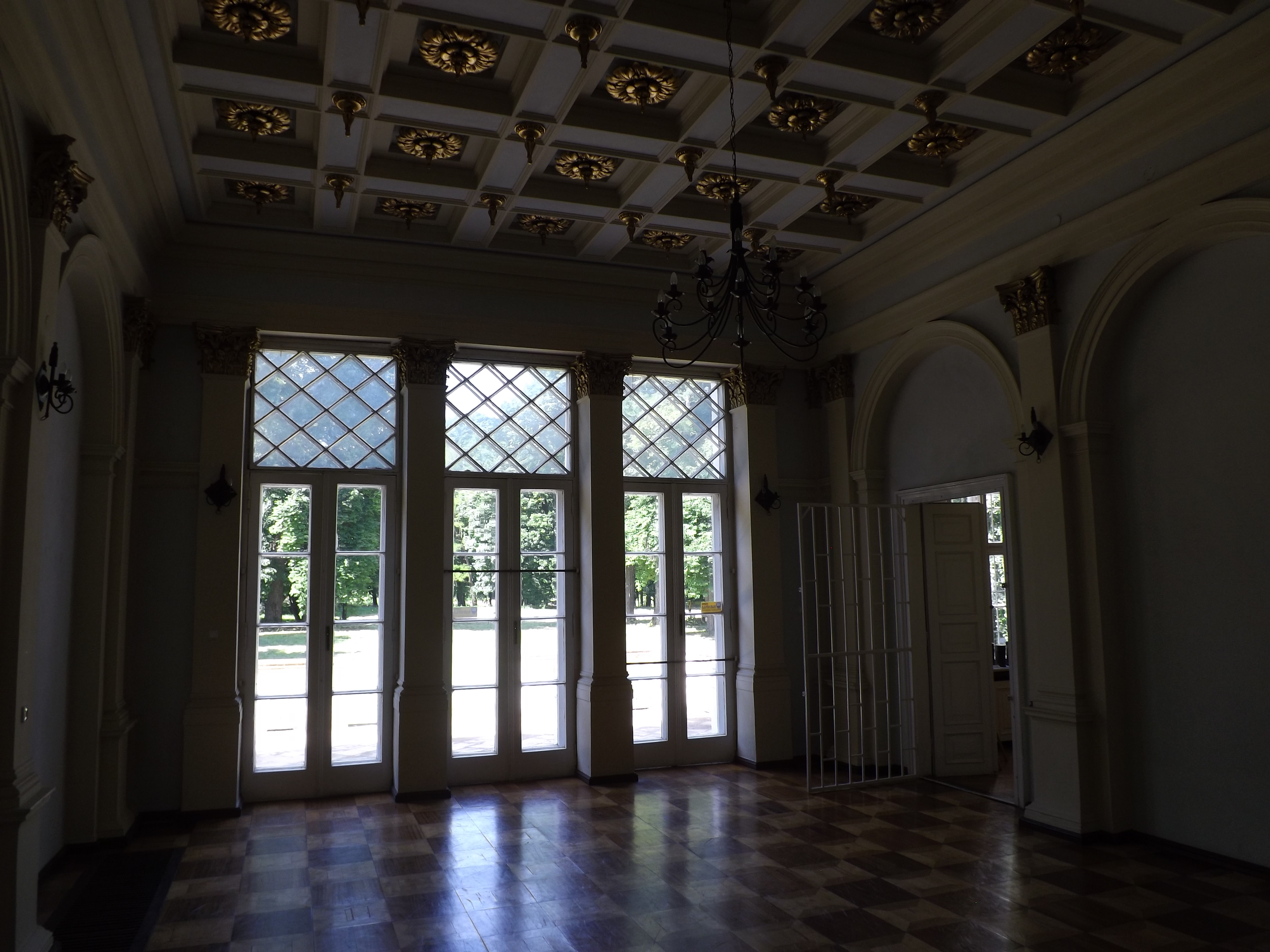 Chroberz sala pałacowa